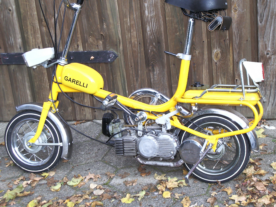 Garelli Fahrrad mit Hilfsmoter. Eigenes Fahrzeug, selbst fotografiert.